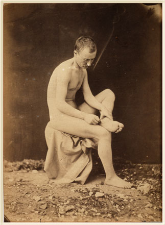 Gaudenzio Marconi (1841-1885), Le tireur d'épine ("Lo spinario"), circa 1870. Gaudenzio Marconi (1841-1885), Le tireur d'épine, ca. 1870.